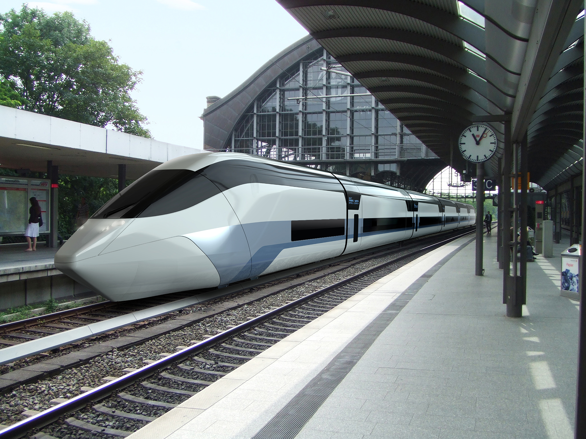 In dem DLR-Projekt "Next Generation Train" soll bis 2013 gezeigt werden, wie der Zug der Zukunft aussehen soll: 400 Stundenkilometer schnell, doppelstöckig, energiesparend - und dabei die bestehende Infrastruktur nutzend. Im DLR Göttingen, das dieses Projekt initiiert hat, entstehen eine einzigartige Tunnel-Simulationsanlage und ein Seitenwindkanal, um die Aerodynamik künftiger Züge zu erforschen.